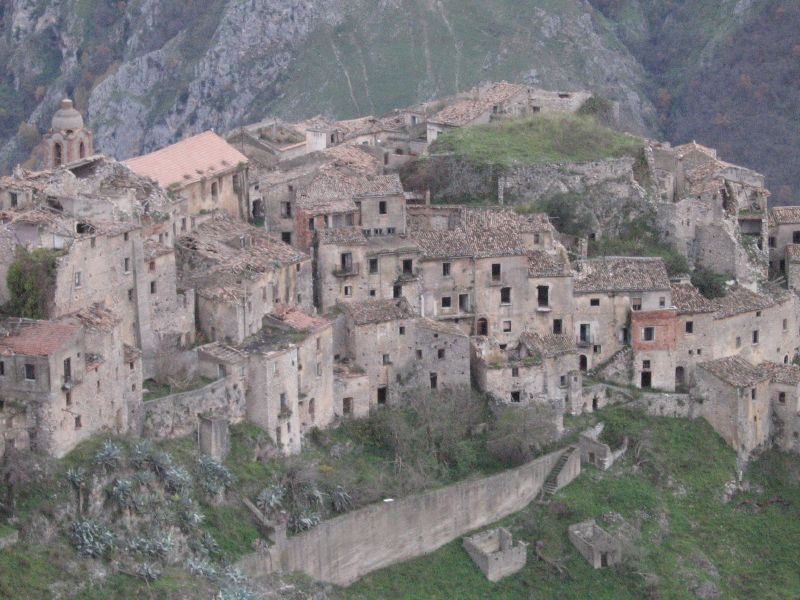 Romagnano, Campania, Italia